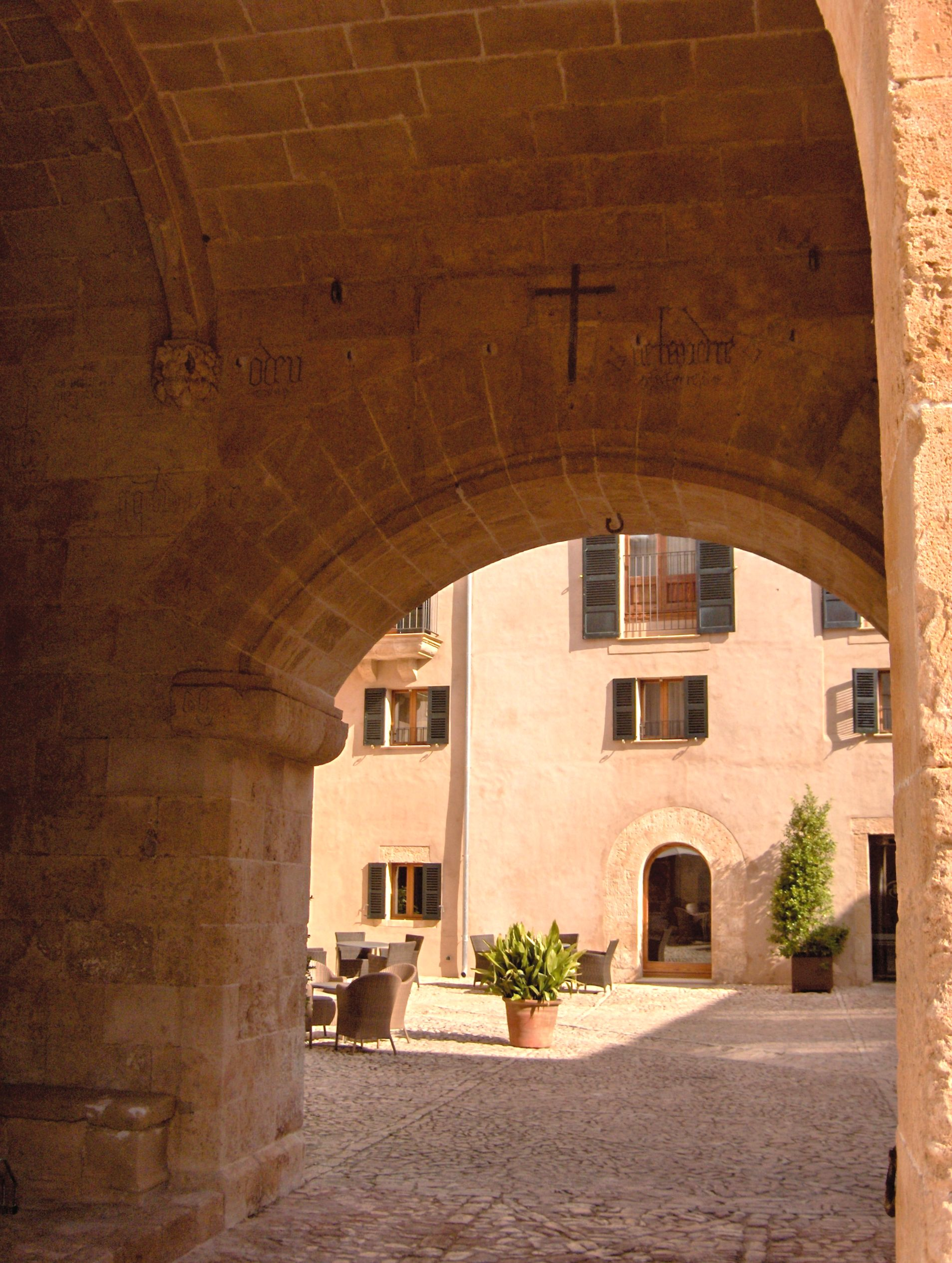 Entrada a la clastra de les cases de la possessió de Sa Torre, a la marina de Llucmajor, Mallorca.